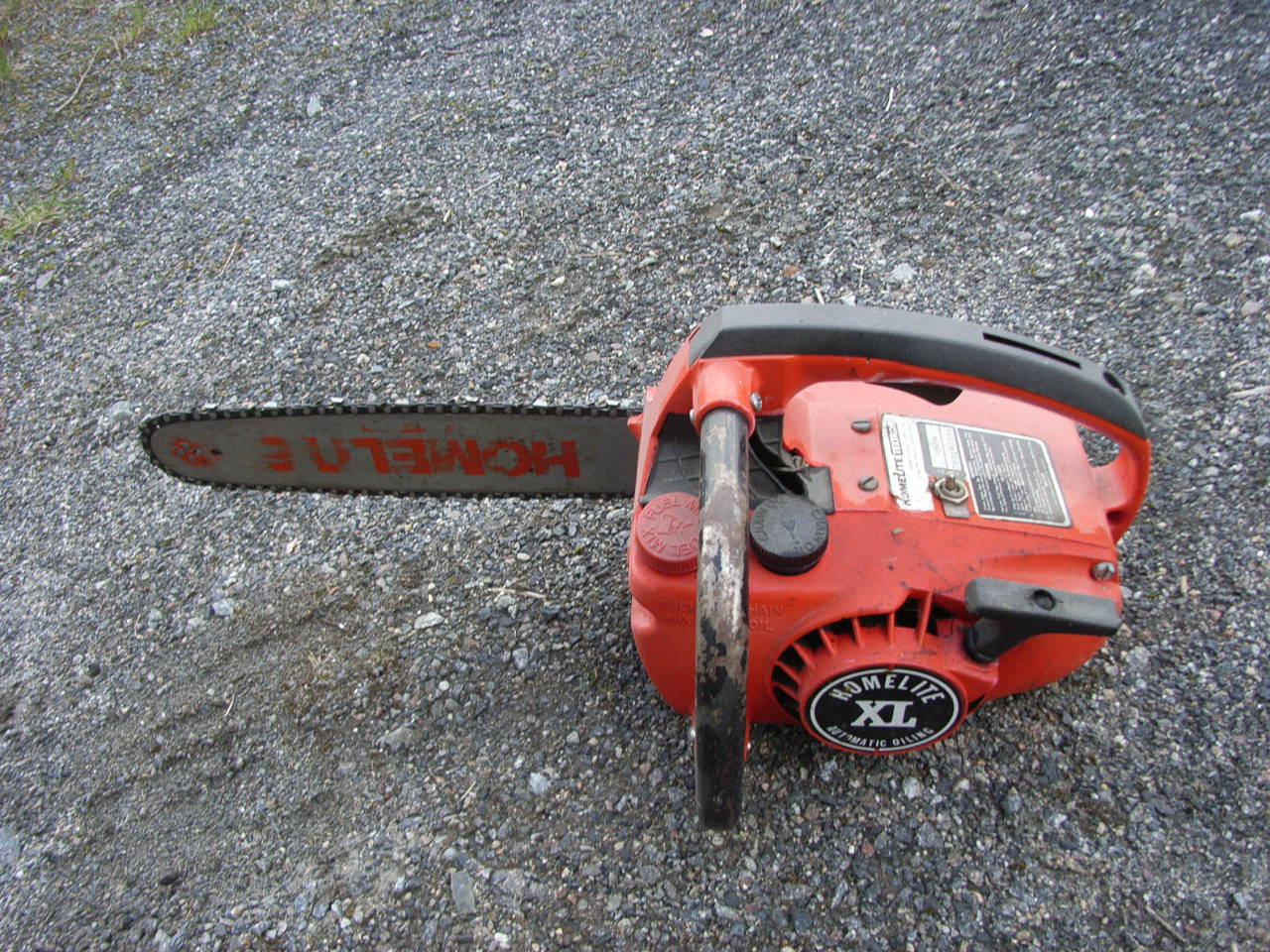 Homelite XL